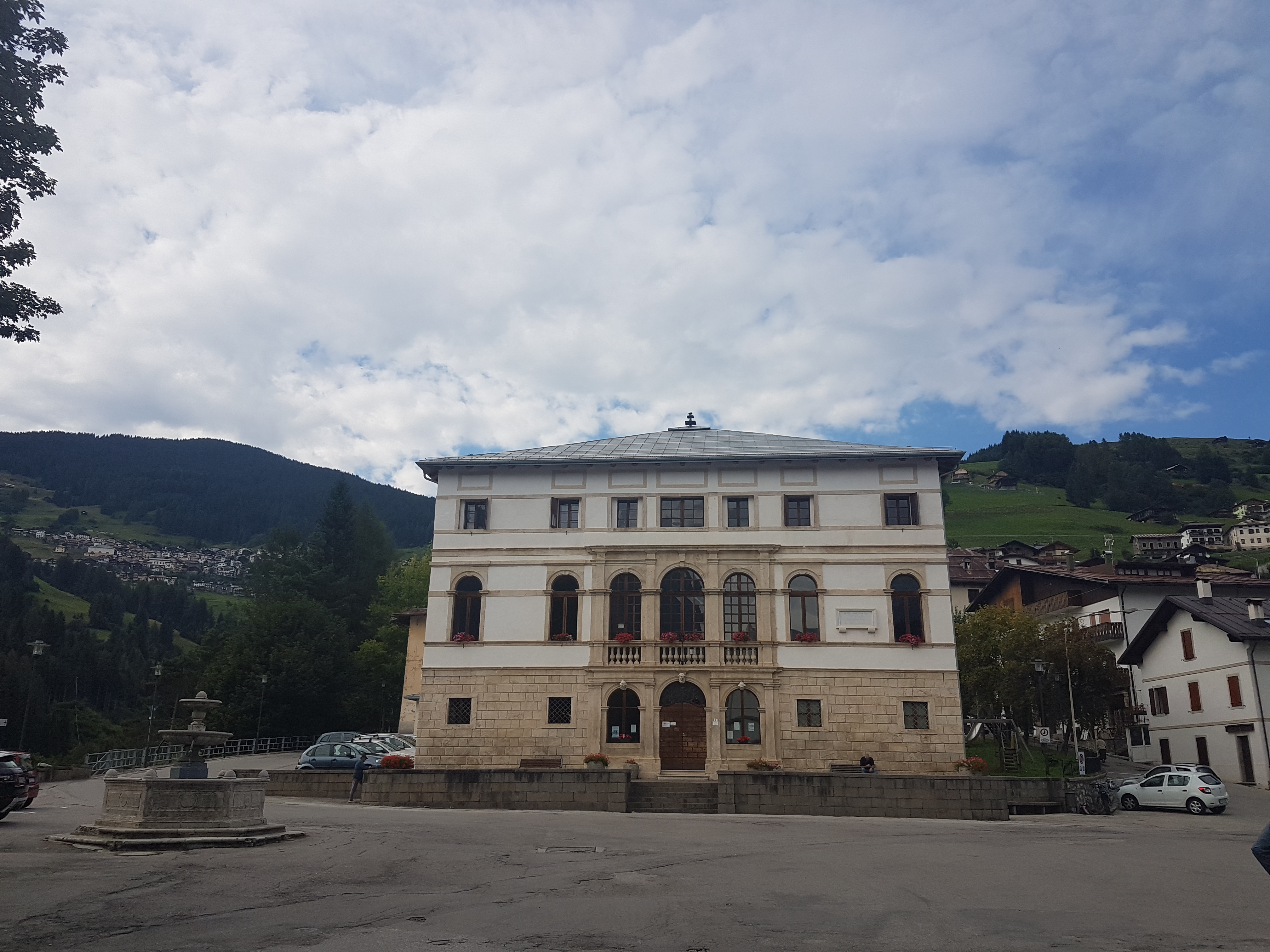 Villa Poli de Pol This is a photo of a monument which is part of cultural heritage of Italy.